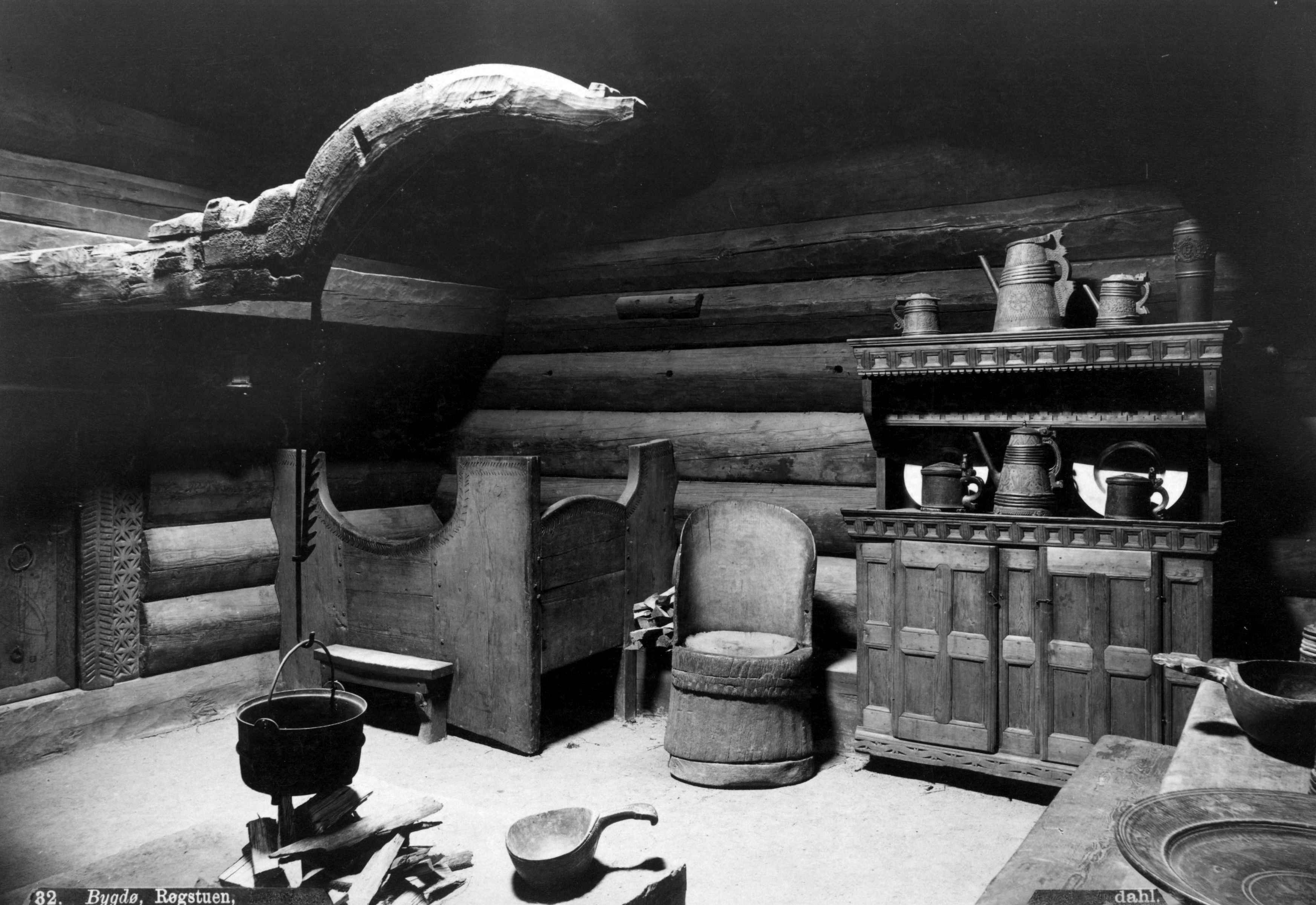 Interiør fra Kjellebergstua, Setesdalstunet på Norsk Folkemuseum, fotografert av Axel Lindahl mellom 1875 - 1896.